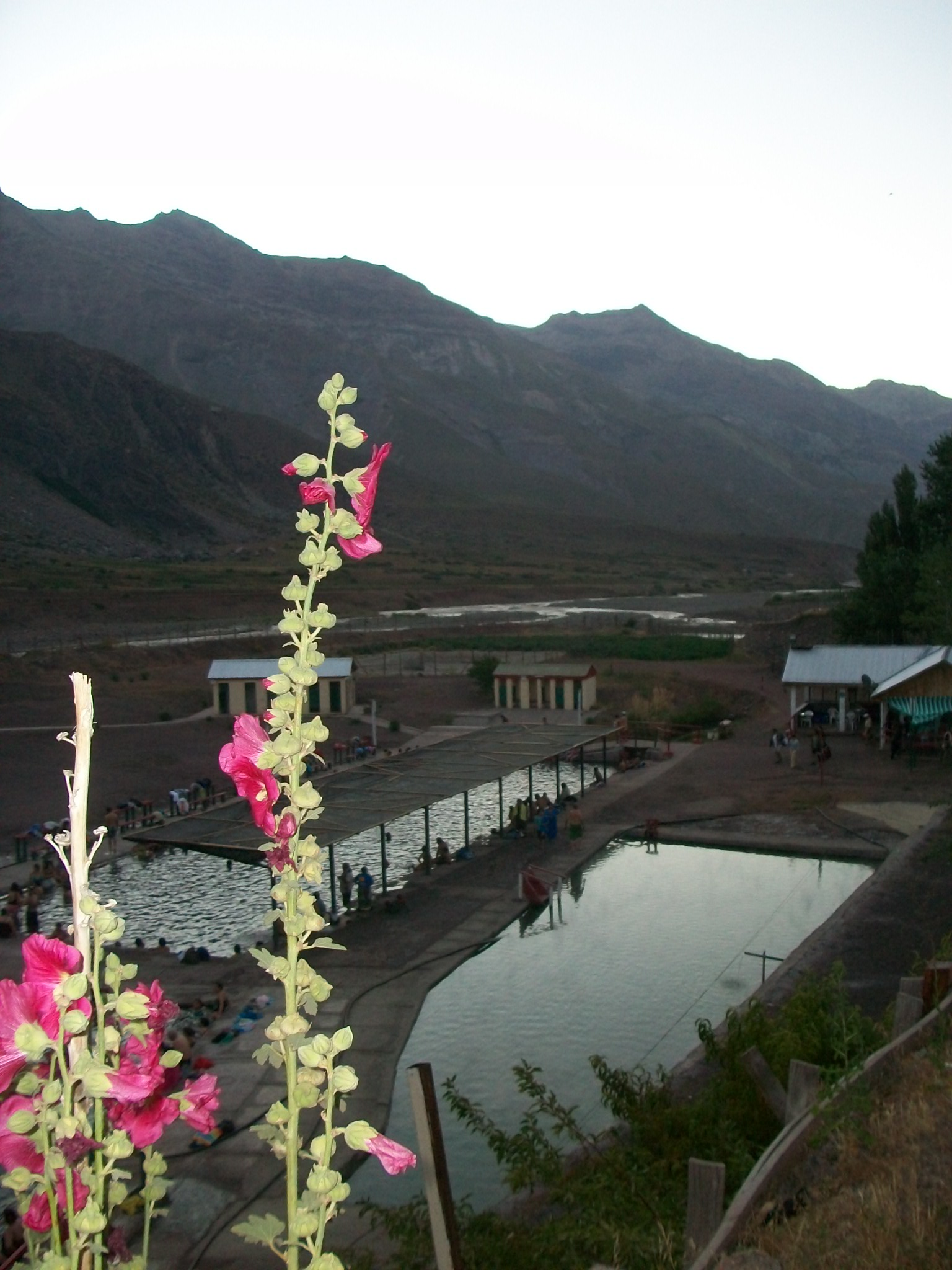 Termas del Flaco